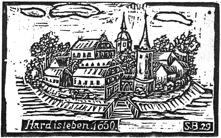 Wasserburg Hardisleben um 1650, nach S. Becker 1939: Alte Ansicht des Schlosses zu Hardisleben, Thüringer Bauernspiegel, Bd. 16, Weimar 1939, S. 322